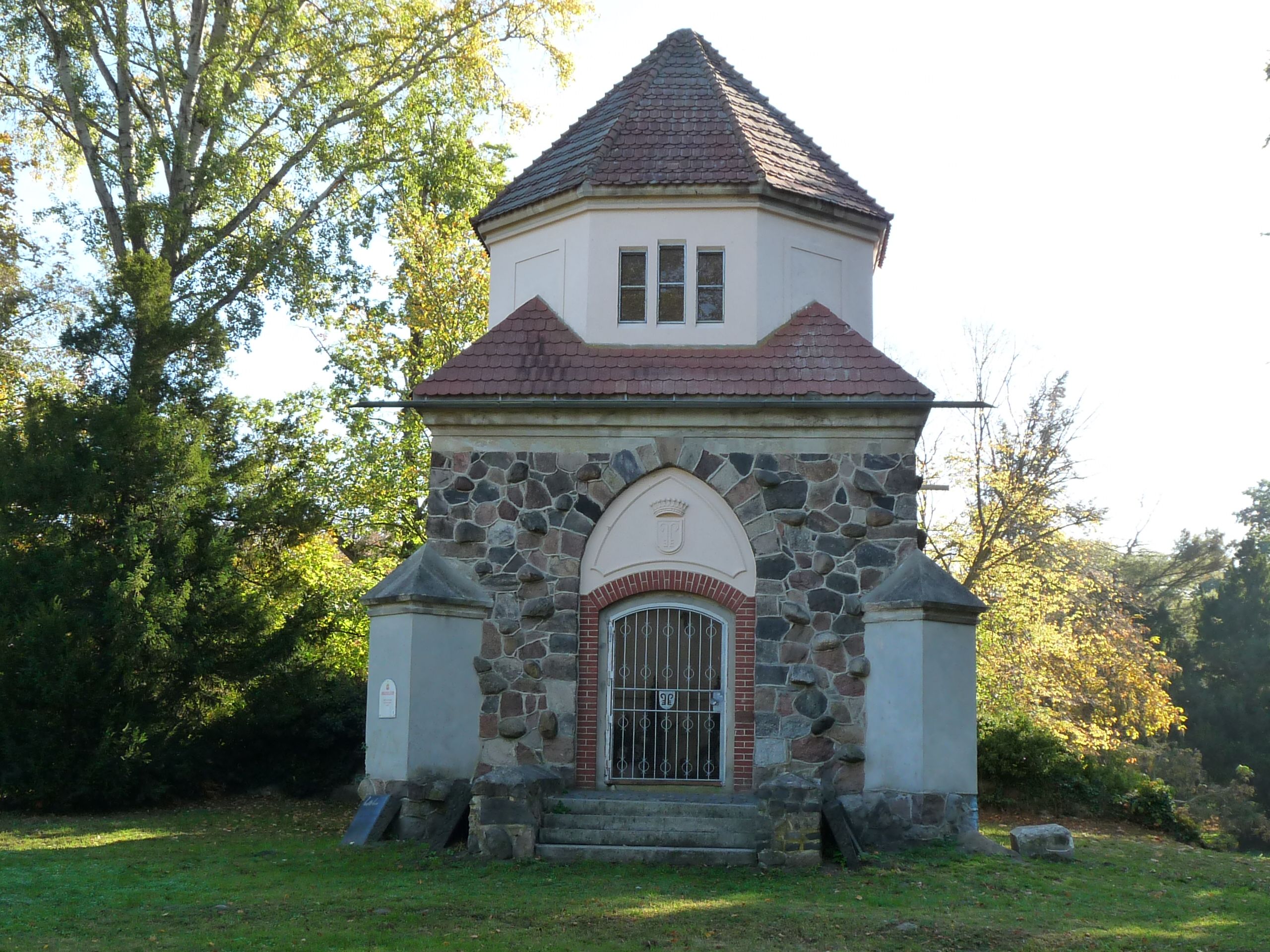 Aus Findlingen errichtetes quadratisches Mausoleum für die 1907 verstorbene Gräfin Erika vom Hagen im Schlosspark Möckern.